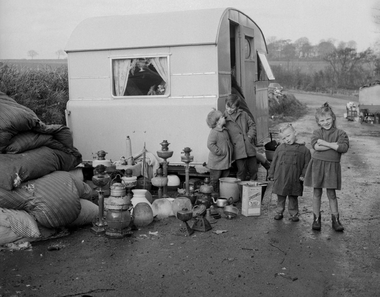 Teitl Cymraeg/Welsh title: Sipswn Gwyddelig yn Sir Fôn Cyfrwng/Medium: Negydd ffilm / Film negative Cyfeiriad/Reference: (gch33589) Rhif cofnod / Record no.: 3471770 Rhagor o wybodaeth am gasgliad Geoff Charles yn Llyfrgell Genedlaethol Cymru More information about the Geoff Charles Collection at the National Library of Wales